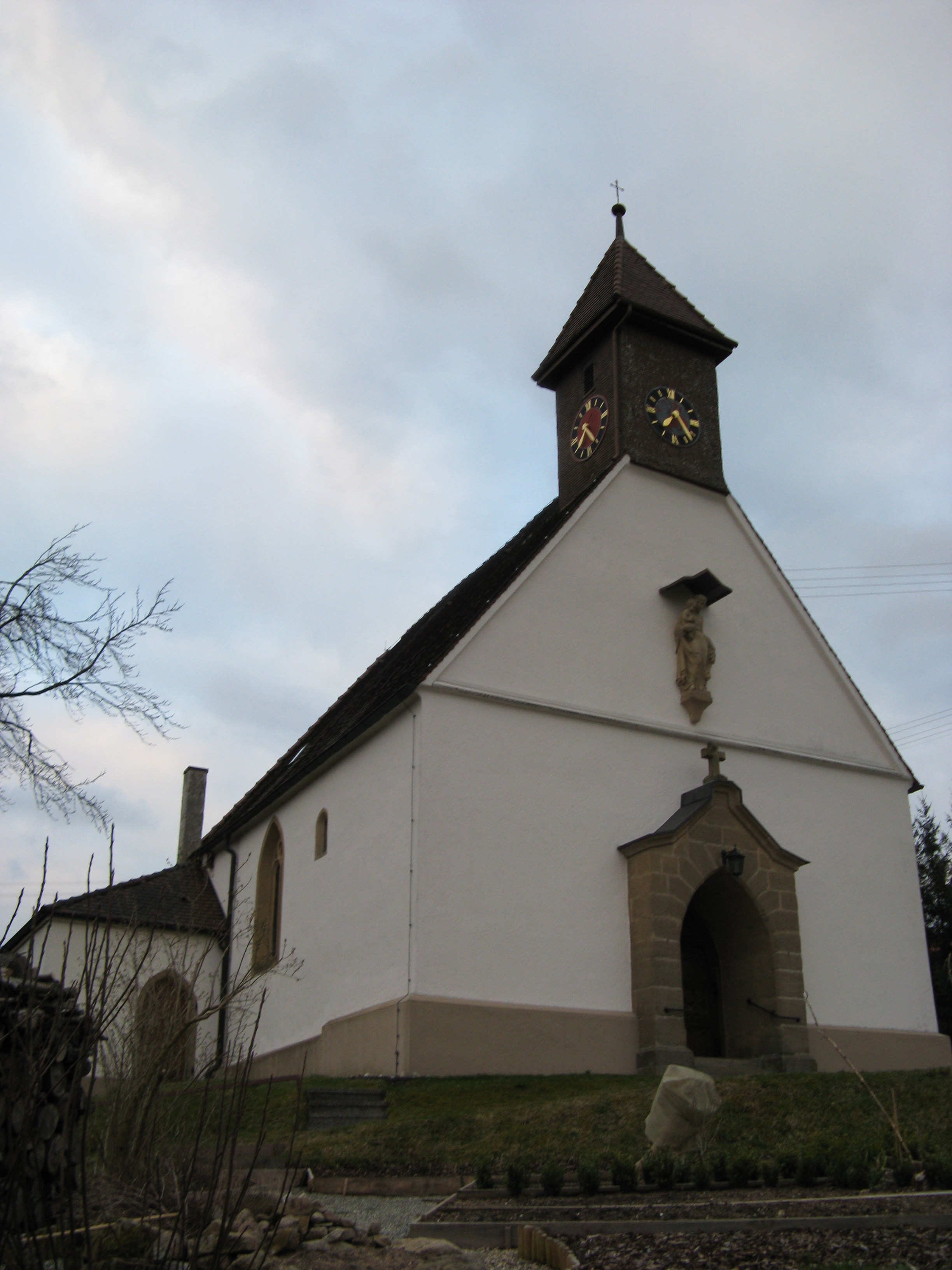 St. Andreas Kirche in Schlechtbach